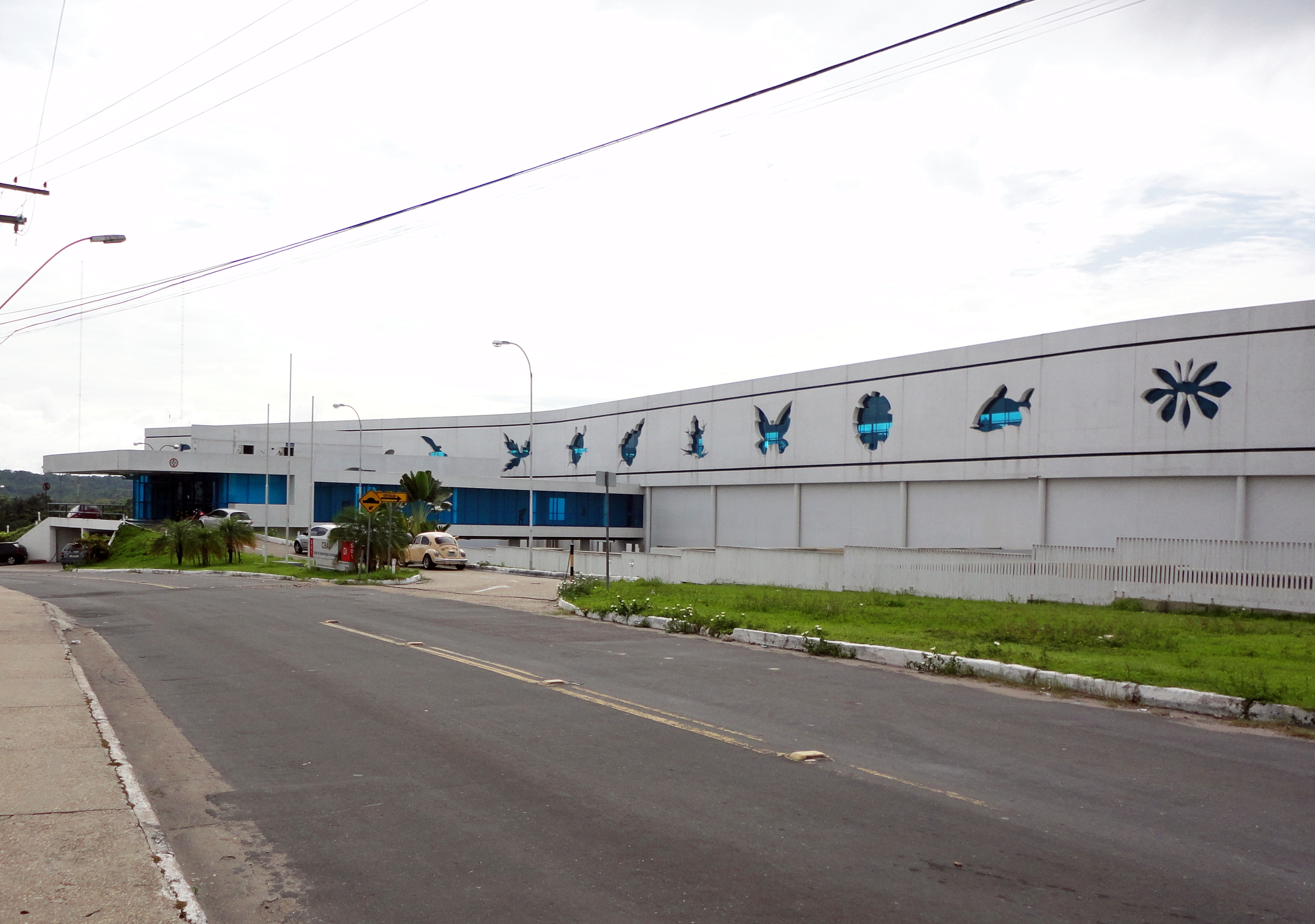 Centro de Biotecnologia da Amazônia, Manaus, Brasil.